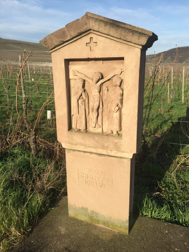 Kreuzweg Trittenheim - Station 12 von 14